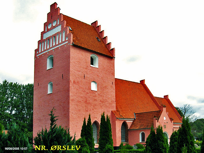 fra sydvest